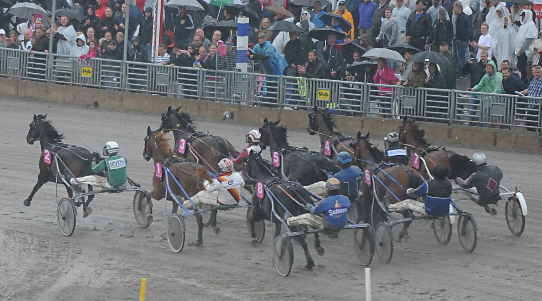 Elitloppsfältet 2013 inför spurten mot mål på Solvalla. Ekipage: 1. Nesta Effe (Roberto Vecchione), 2. Sebastian K. (Åke Svanstedt), 3. Raja Mirchi (Lutfi Kolgjini), 4. Nahar (Robert Bergh, vinnare), 5. Brad De Veluwe (Tuomas Korvenoja), 6. Timoko (Jos Verbeeck), 7. Arch Madness (Trond Smedshammer) och 8. Formula One (Björn Goop).